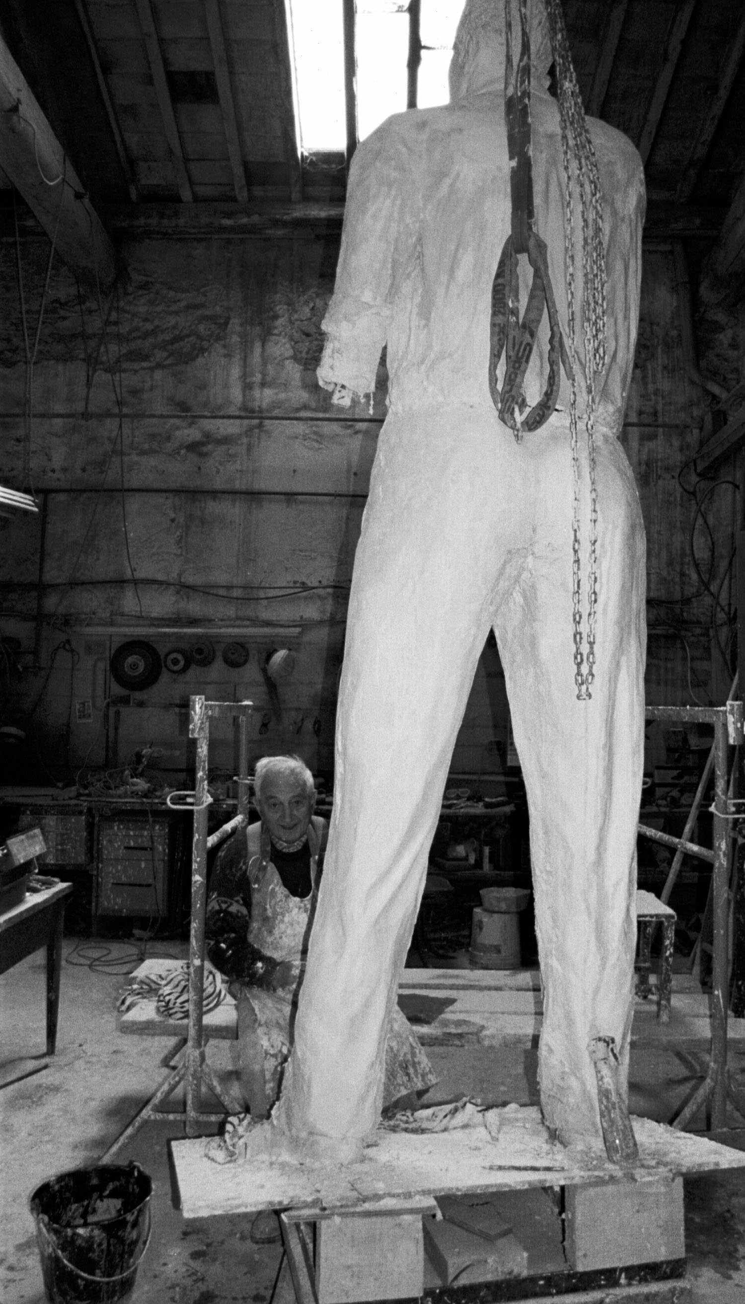 Pierre Nocca dans l'atelier realisant le jouteur